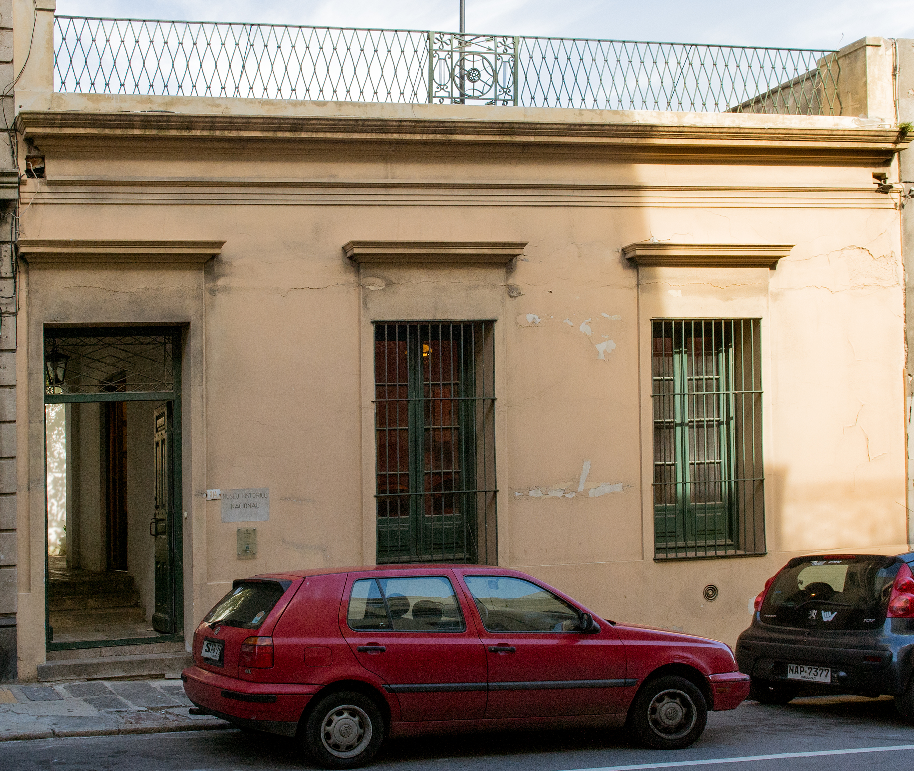 Fachada de la Casa de Garibaldi, Museo Histórico Nacional - Casa de José Garibaldi, Montevideo, Uruguay